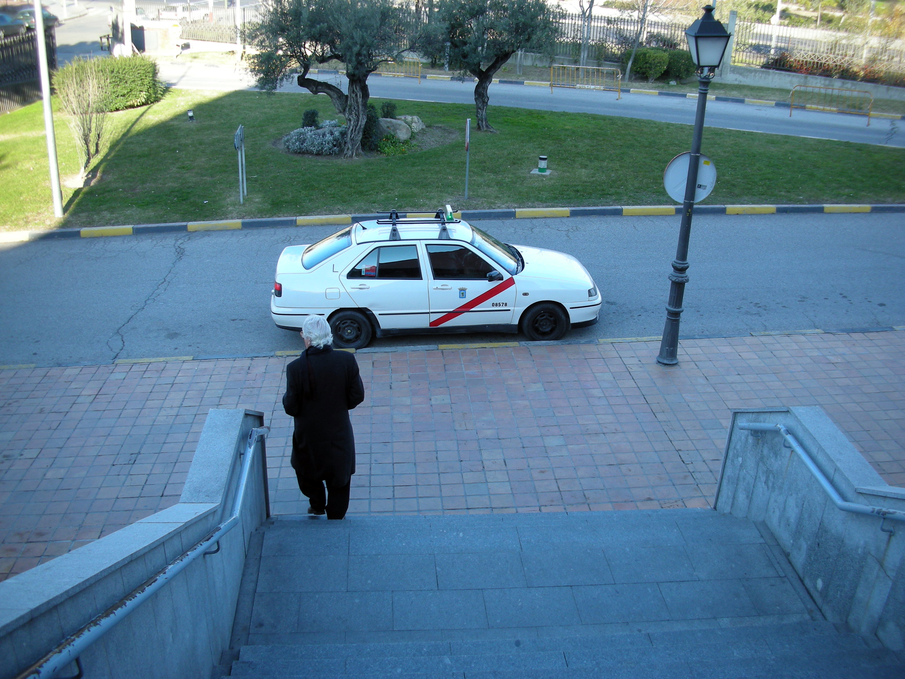 SEAT Toledo 1 Taxi para el tanatorio